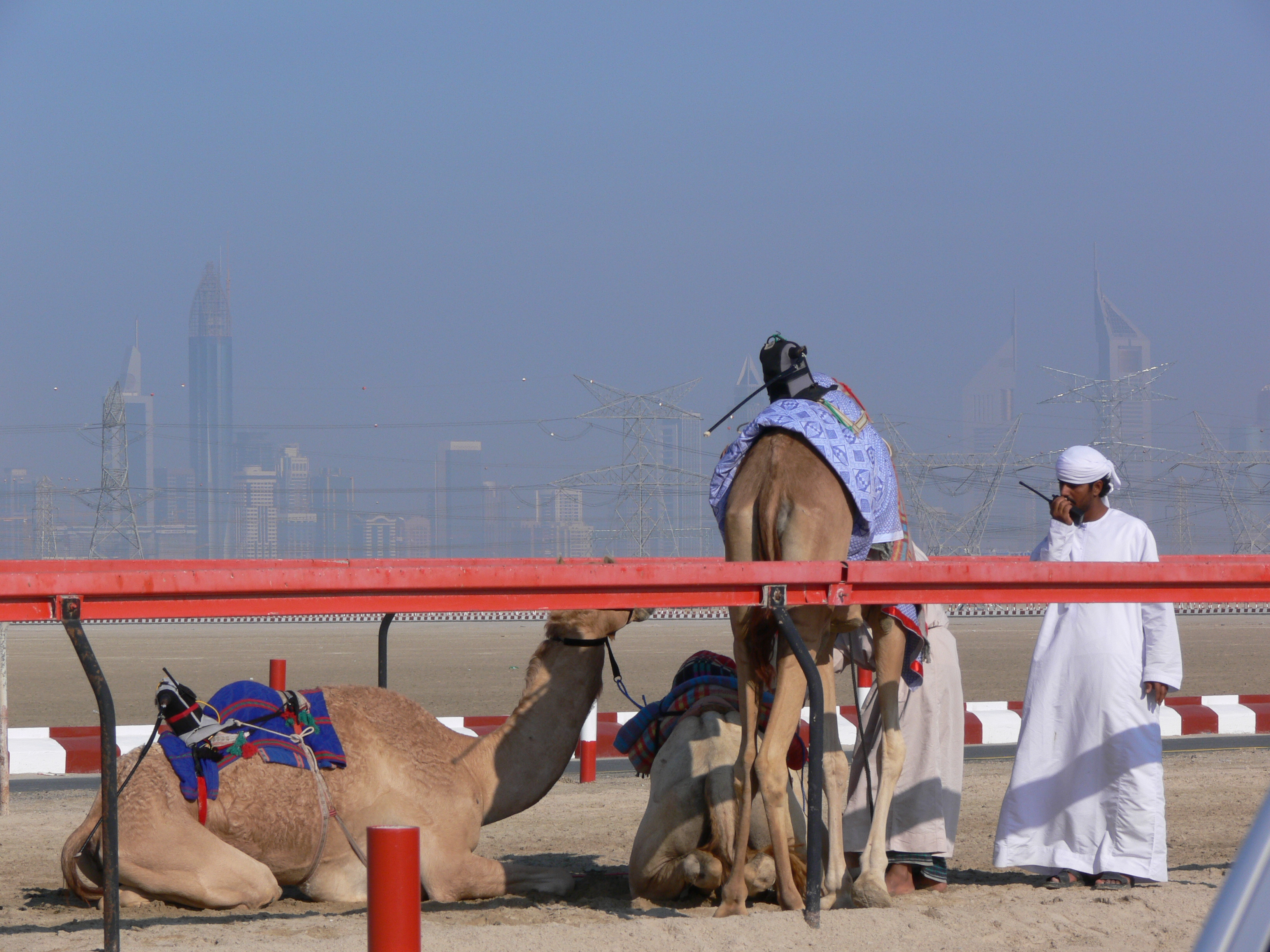 Some camels